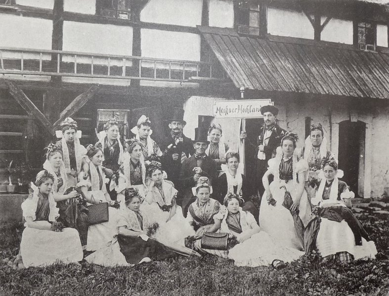 Festtrachten aus dem Meißner Hochland, Lichtdruck aus einer Mappe zu sächsischen Volkstrachten und Bauernhäusern von 1897